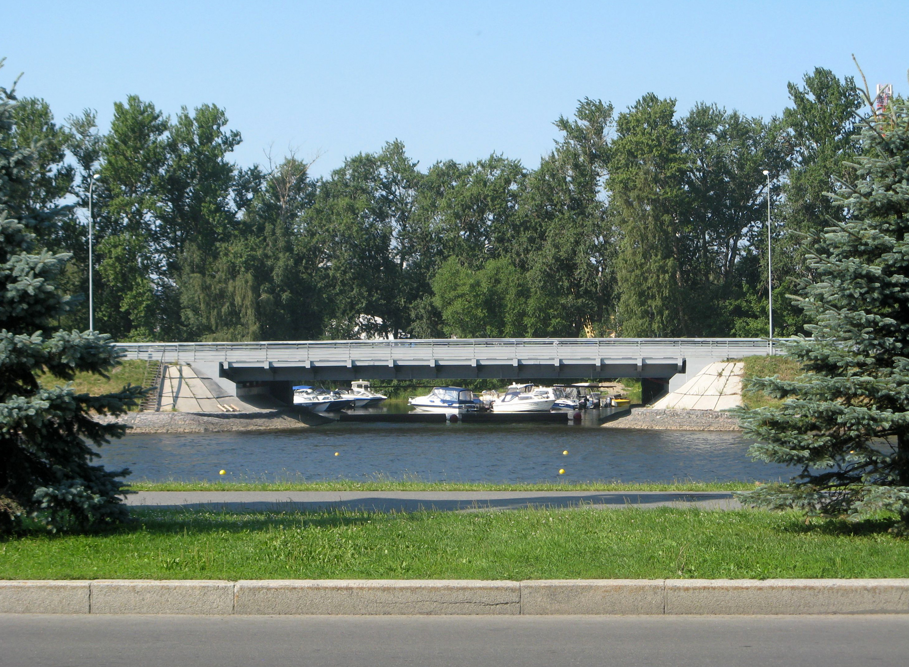 Санкт-Петербург, наб. Гребного канала, Бычий мост